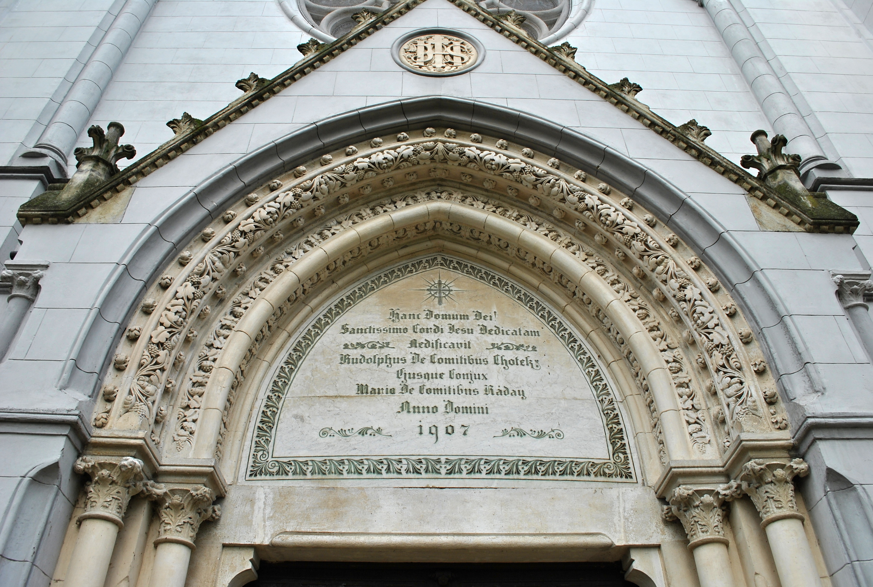 Futog - Serbia - Catholic church - commemorative inscription from 1907